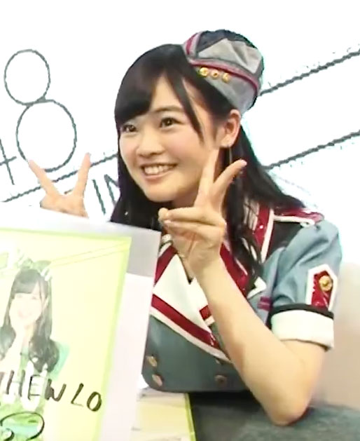 中文（香港）: HKT48 Fans Meeting 2015-05-12 @ 西九龍中心